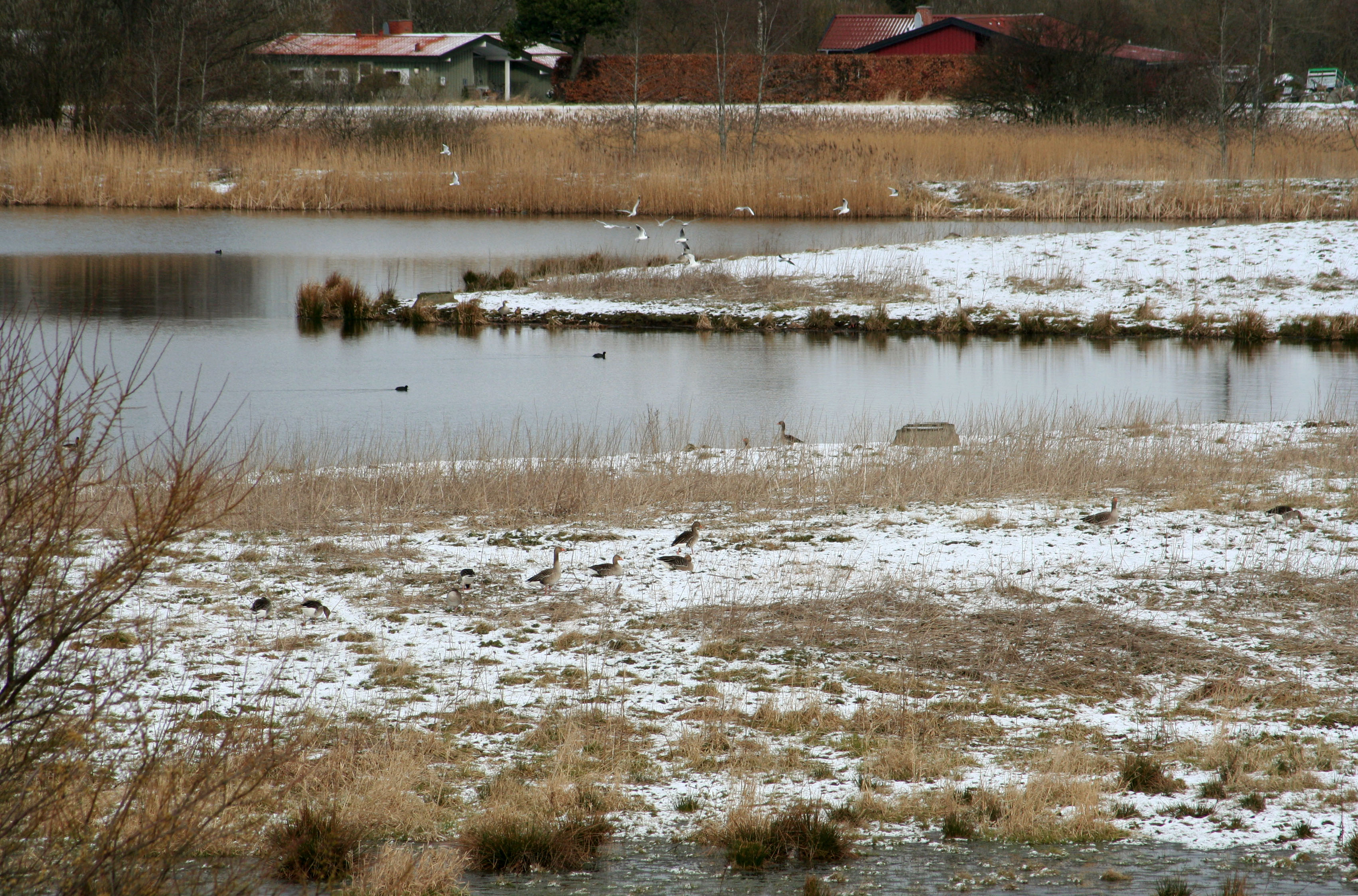 Pøleå gennemløber Strødam. Blishøns, grågæs, måger.